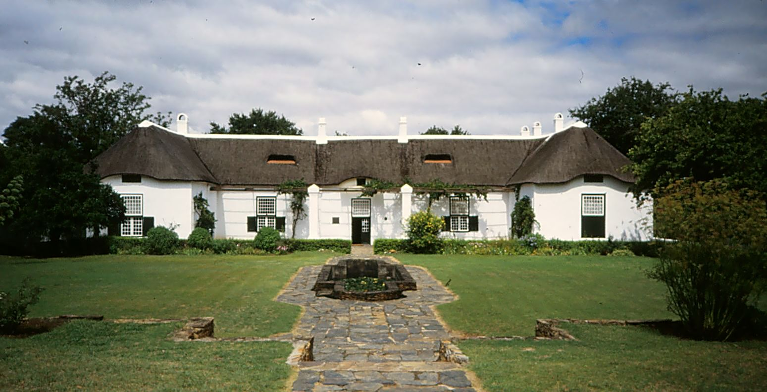 Det lokalhistoriske museum i Swellendam, Sydafrika. Februar 1997. This media shows a South African Protected Site with SAHRA file reference 9/2/092/0028.